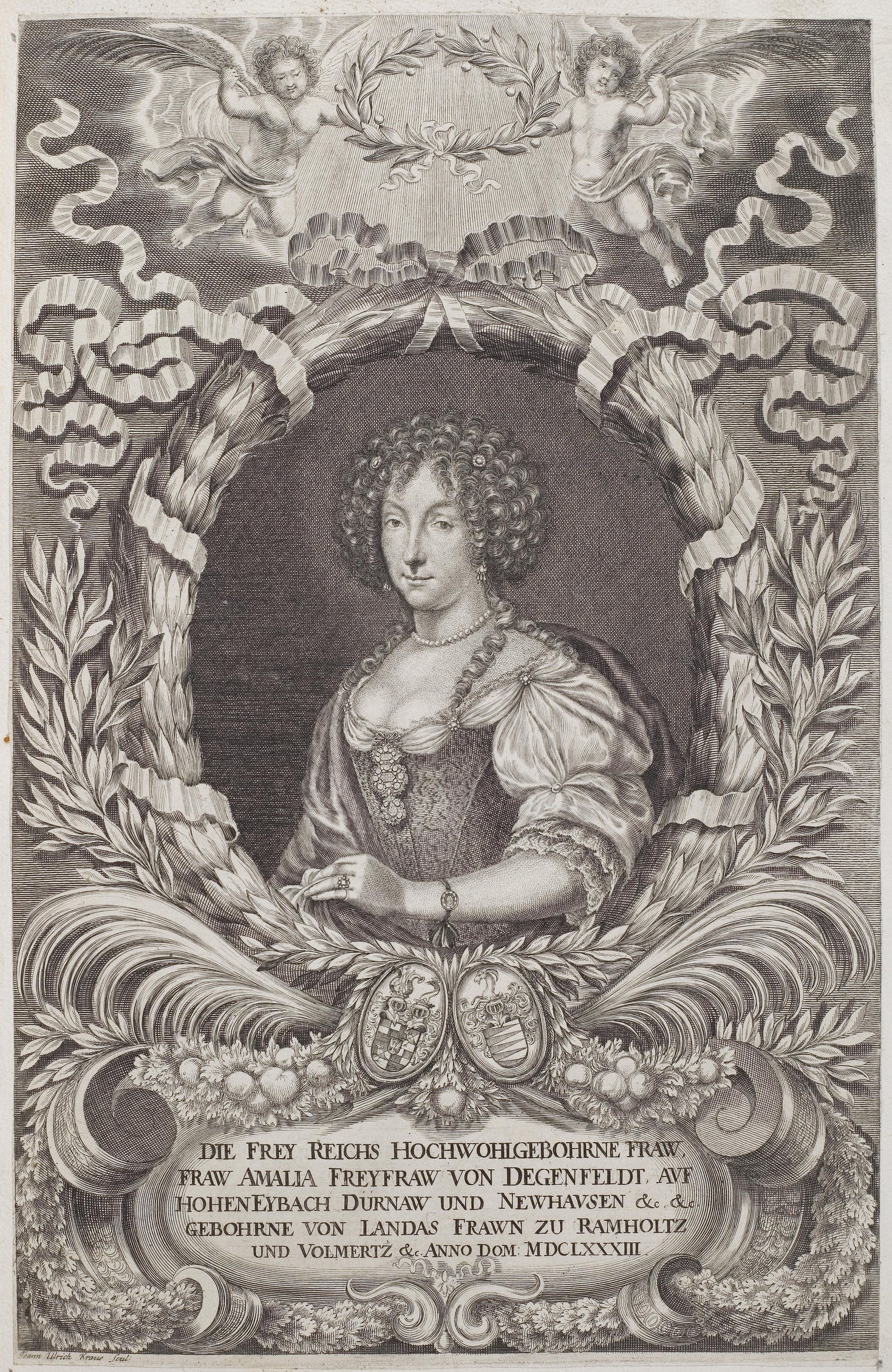 Grafik aus dem Klebeband Nr. 2 der Fürstlich Waldeckschen Hofbibliothek Arolsen Motiv: Amalia von Degenfeld (1647–1683), Kammerfräulein der Prinzessin Elisabeth Charlotte von der Pfalz, Ehefrau des Freiherrn Maximilian von Degenfeld